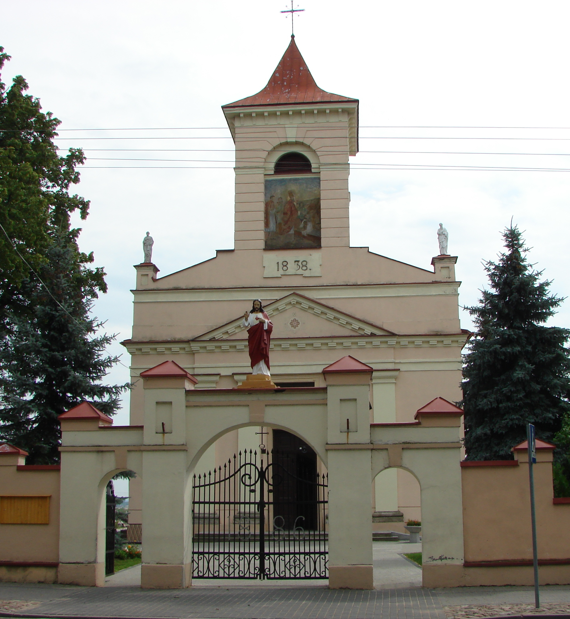 Grabów, kościół par. p.w. św. Stanisława Biskupa, 1838